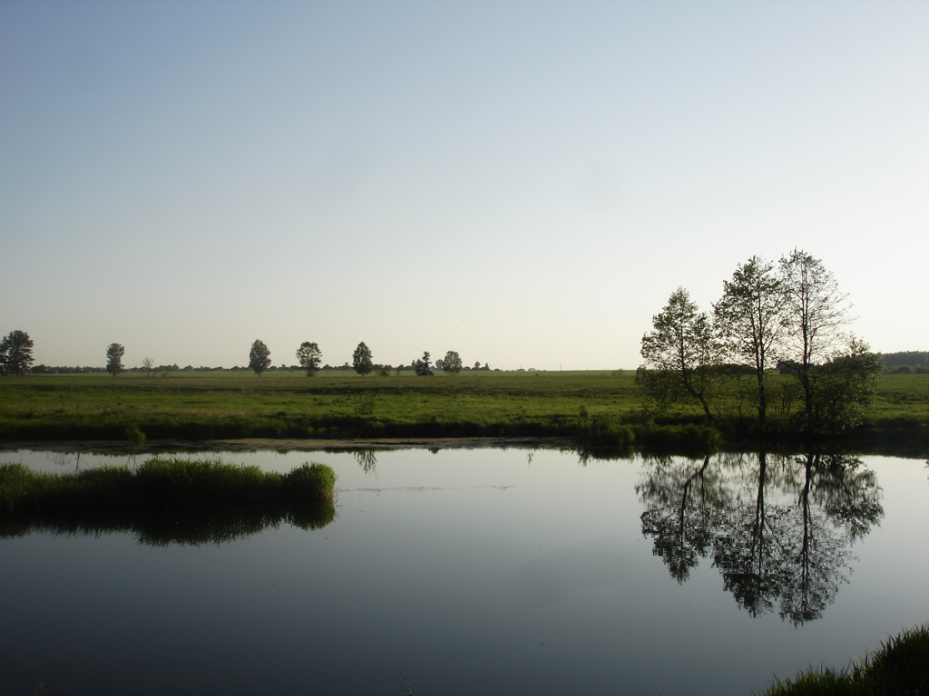 Берег реки Судогды недалеко от деревни Бережки